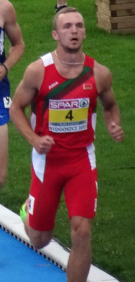 Młodzieżowe Mistrzostwa Europy w Lekkoatletyce U23 w Bydgoszczy 2017; dziesięciobój mężczyzn, bieg na 1500 m finał